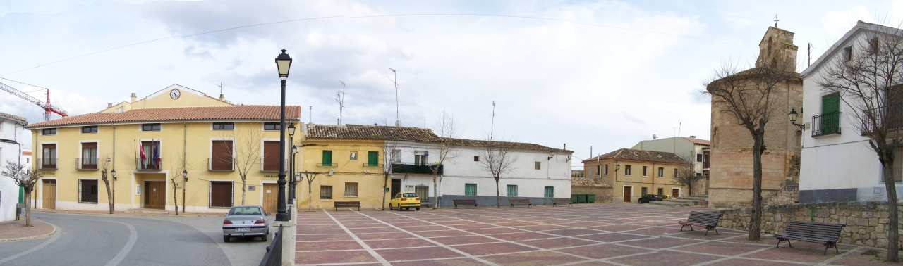 Arcas del Villar (Cuenca, España) - Plaza Mayor (Main Square) - Panorámica utilizando Autopano y Hugin